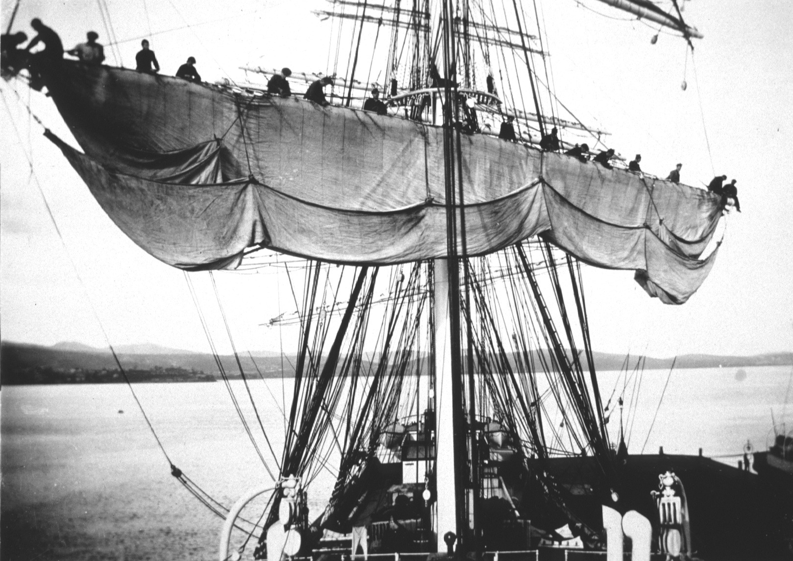 Crew unfurling sails on the barque ‚Medway‘ (Medway launched in 1902 at Dumbarton as a 4 masted steel barque with the name of ‚Ama Beganakoa‘ ; converted powered ship in 1918 and name changed to ‚Myr Shell‘).